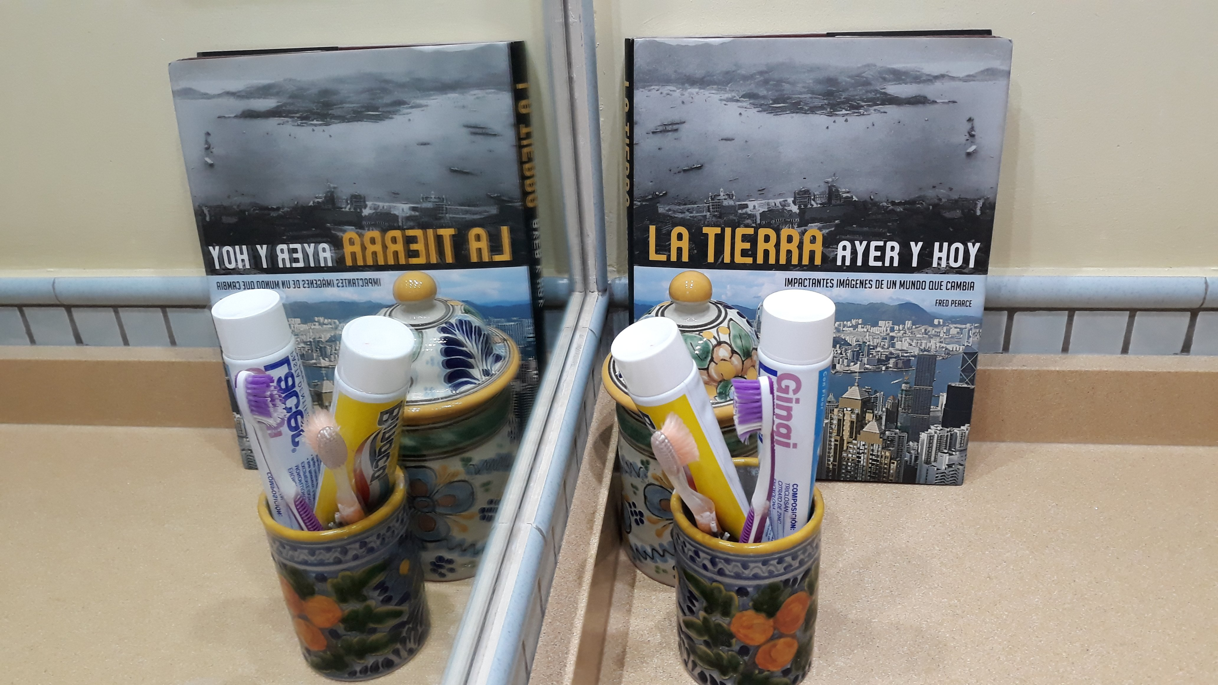 Espejo plano. Ejemplo de reflexión especular